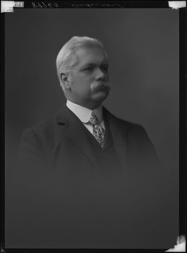 Photo du Colonel William Patrick Anderson datée de février 1904. La photo provient des studios Topley